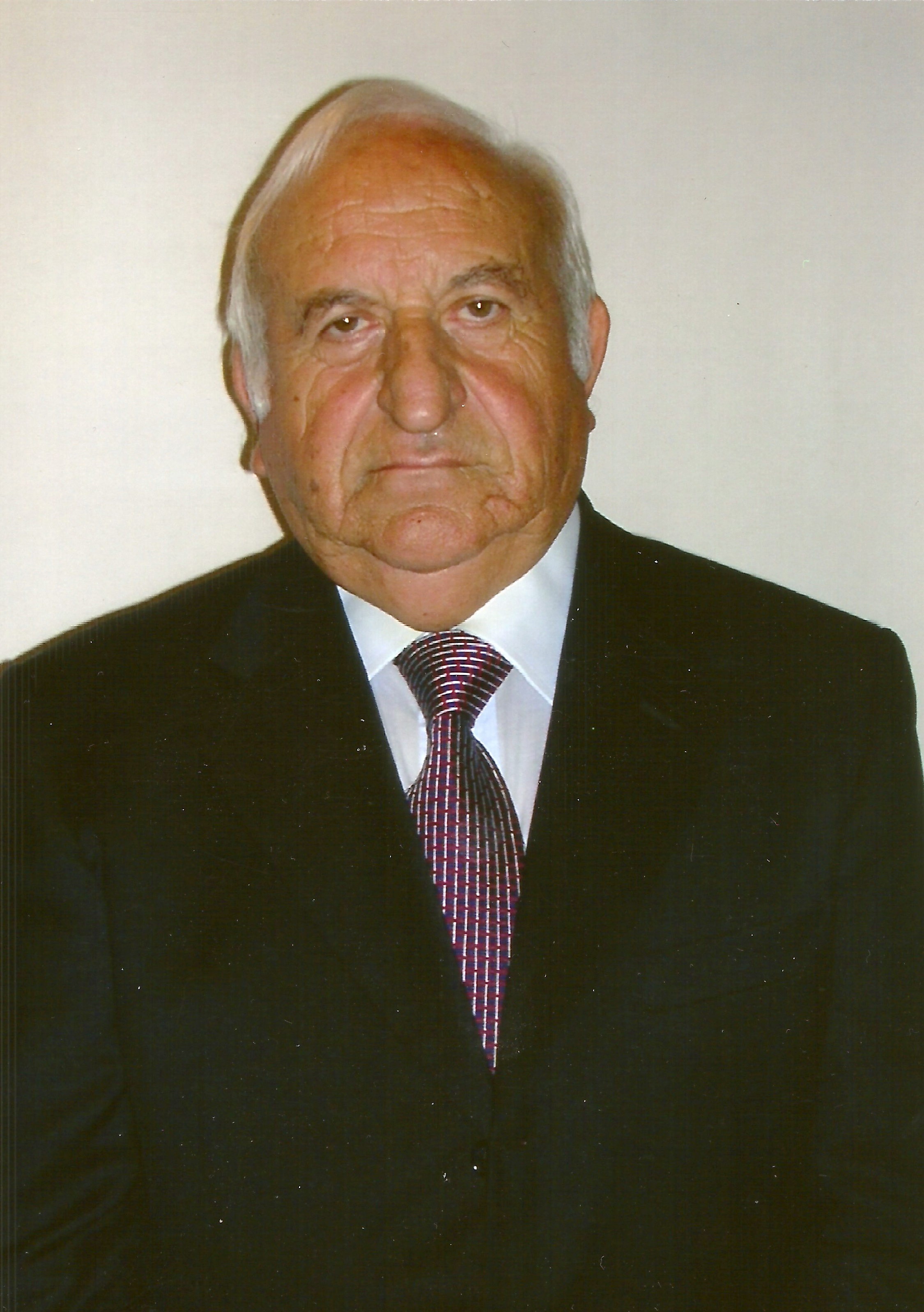 Alessandro Petruccelli